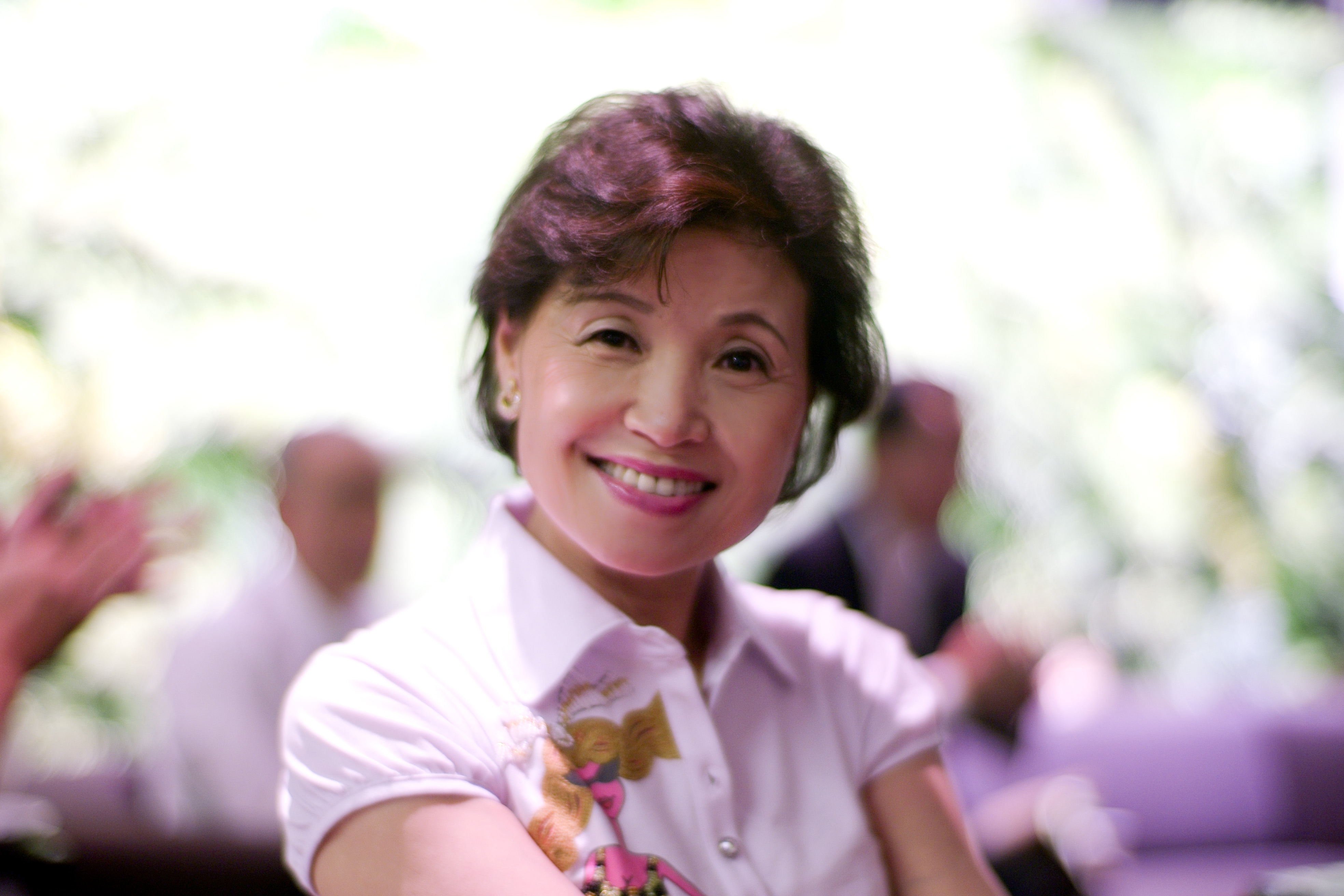 Reiko Okutani